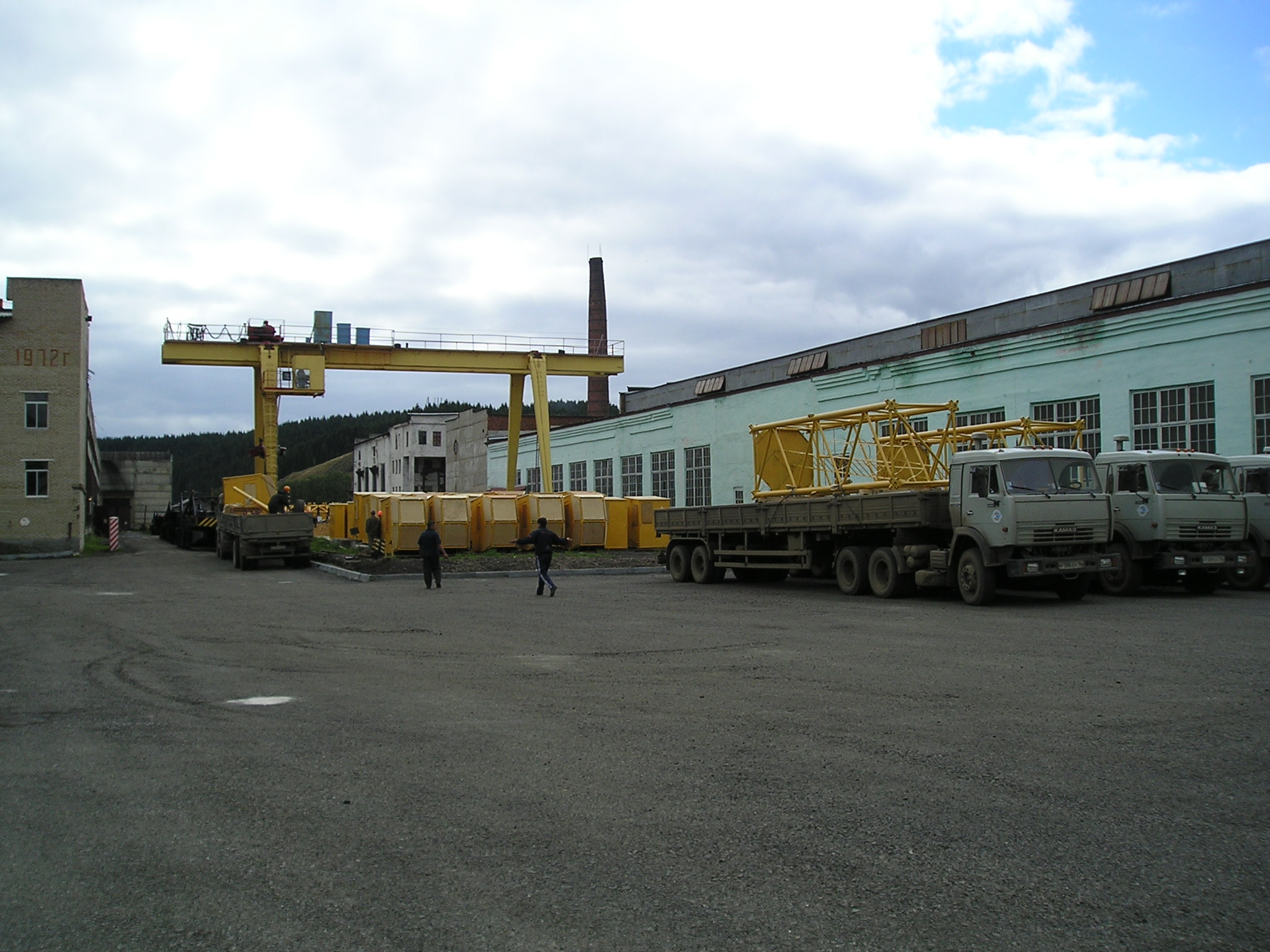 Отгрузка башенных кранов с завода